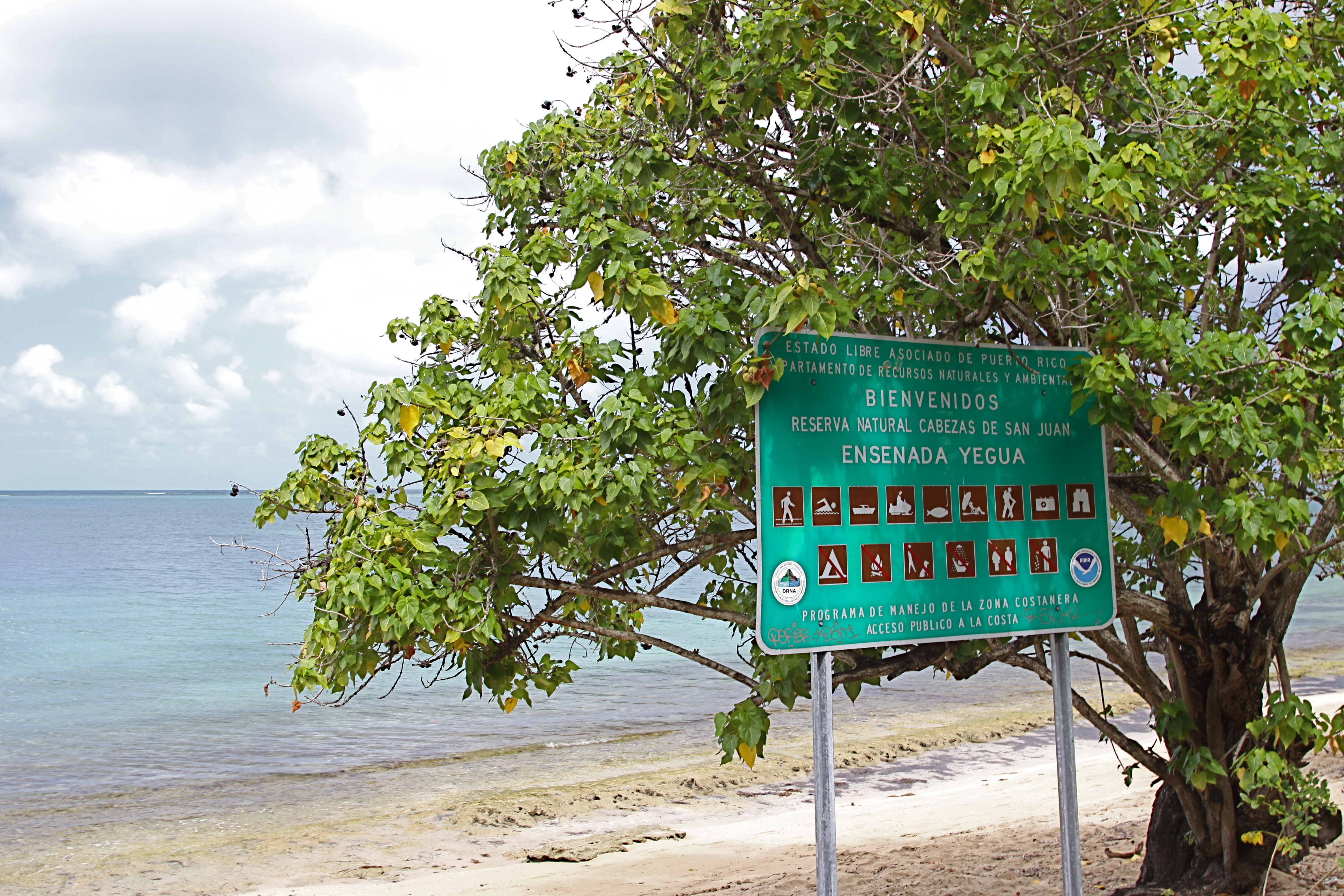 Reserva Natural Cabezas de San Juan en Puerto Rico